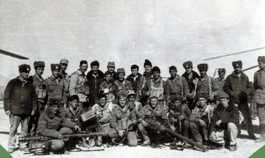 186 ООСпН 22 ОБрСН после захвата трёх ПЗРК СТИНГЕР. 1 ряд сидя слева - направо: 2 ряд: 5 - Ковтун В., 7 - Сергеев Е. (Герой РФ посмертно), 8 - Чебоксаров В.